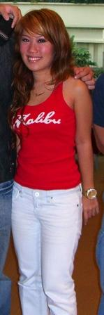 Xiaxue, Singaporean blogger